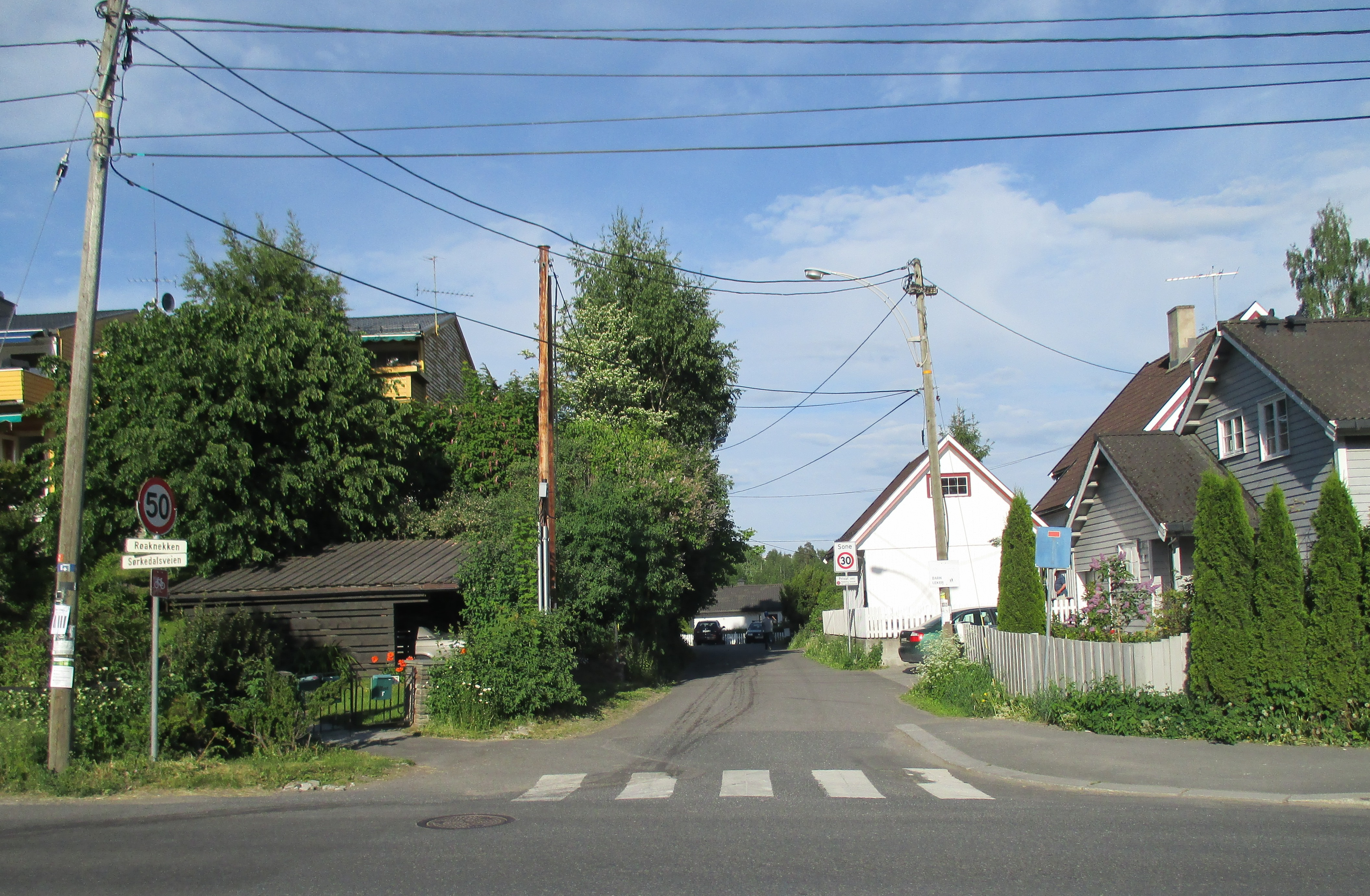 Røaknekken på Røa i Oslo